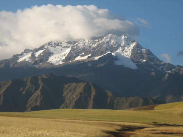 Nevado en la Cordillera de los Andes en Cusco.